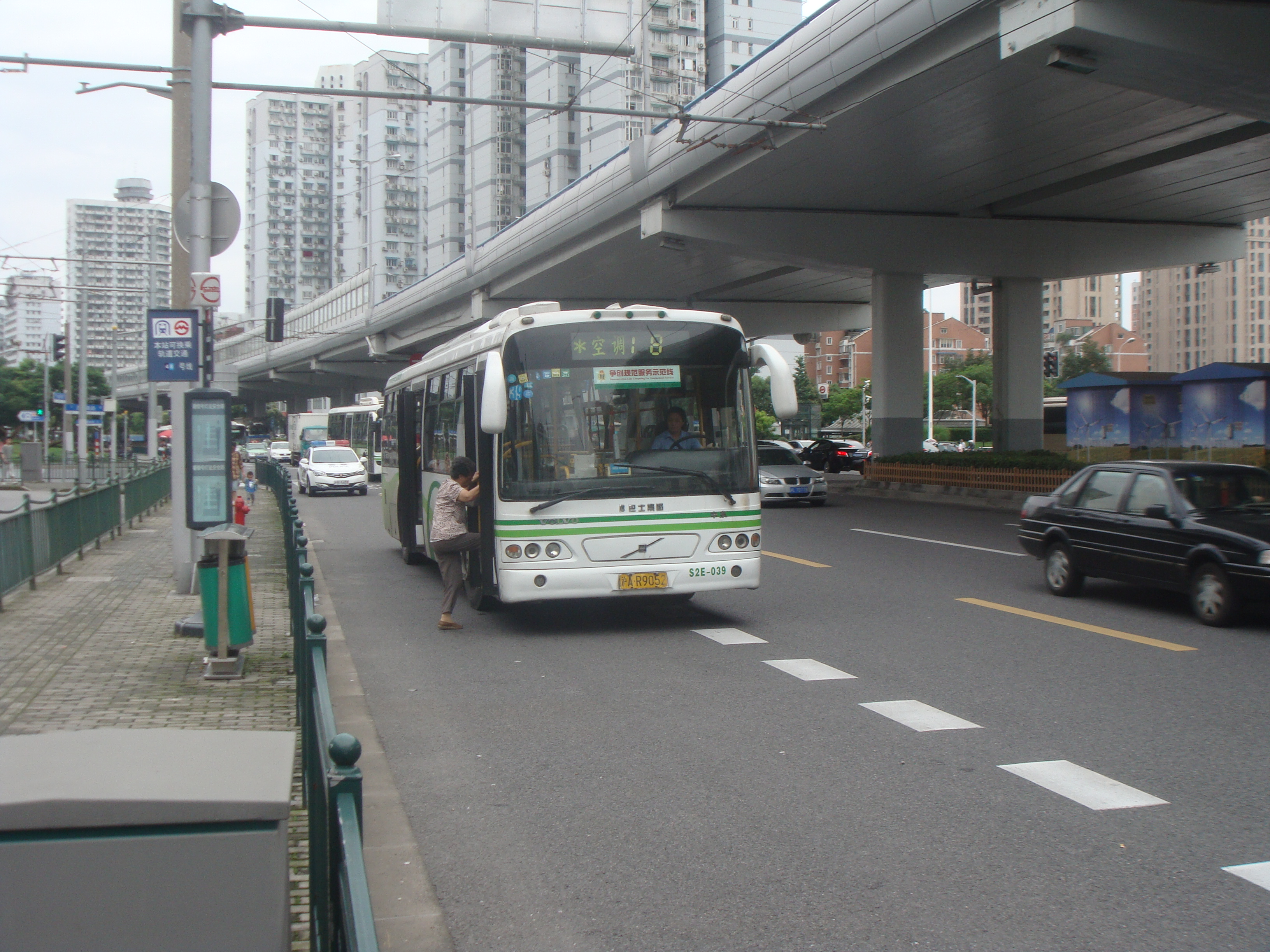 中文（中国大陆）: 上海公交18路，自编号S2E-039，车型SWB6120V3，摄于中山南一路西藏南路。